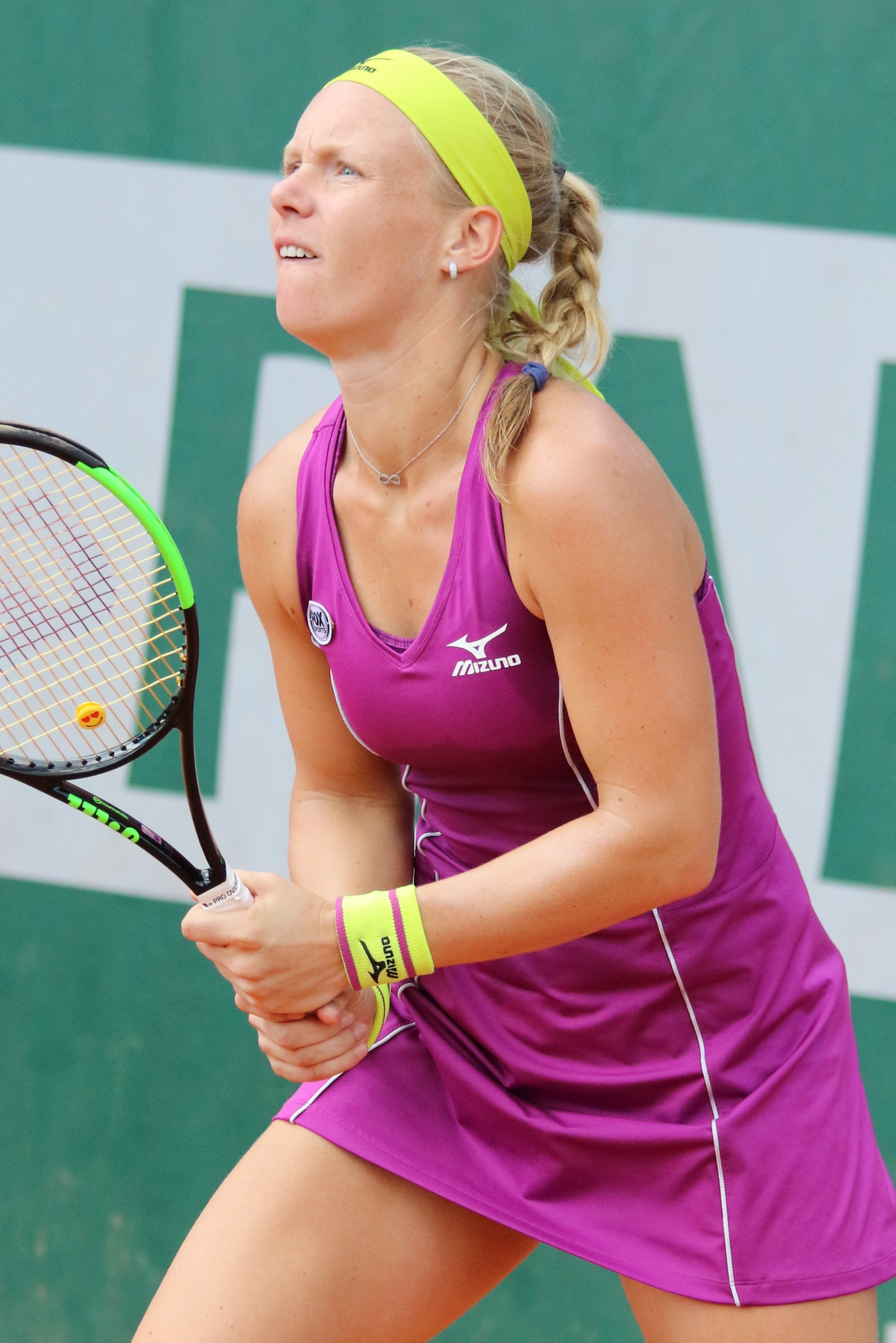 Bertens RG18 (2)